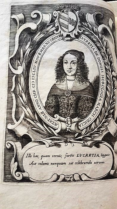 ritrae la marchesa Lucrezia Obizzi, vissuta nel seicento